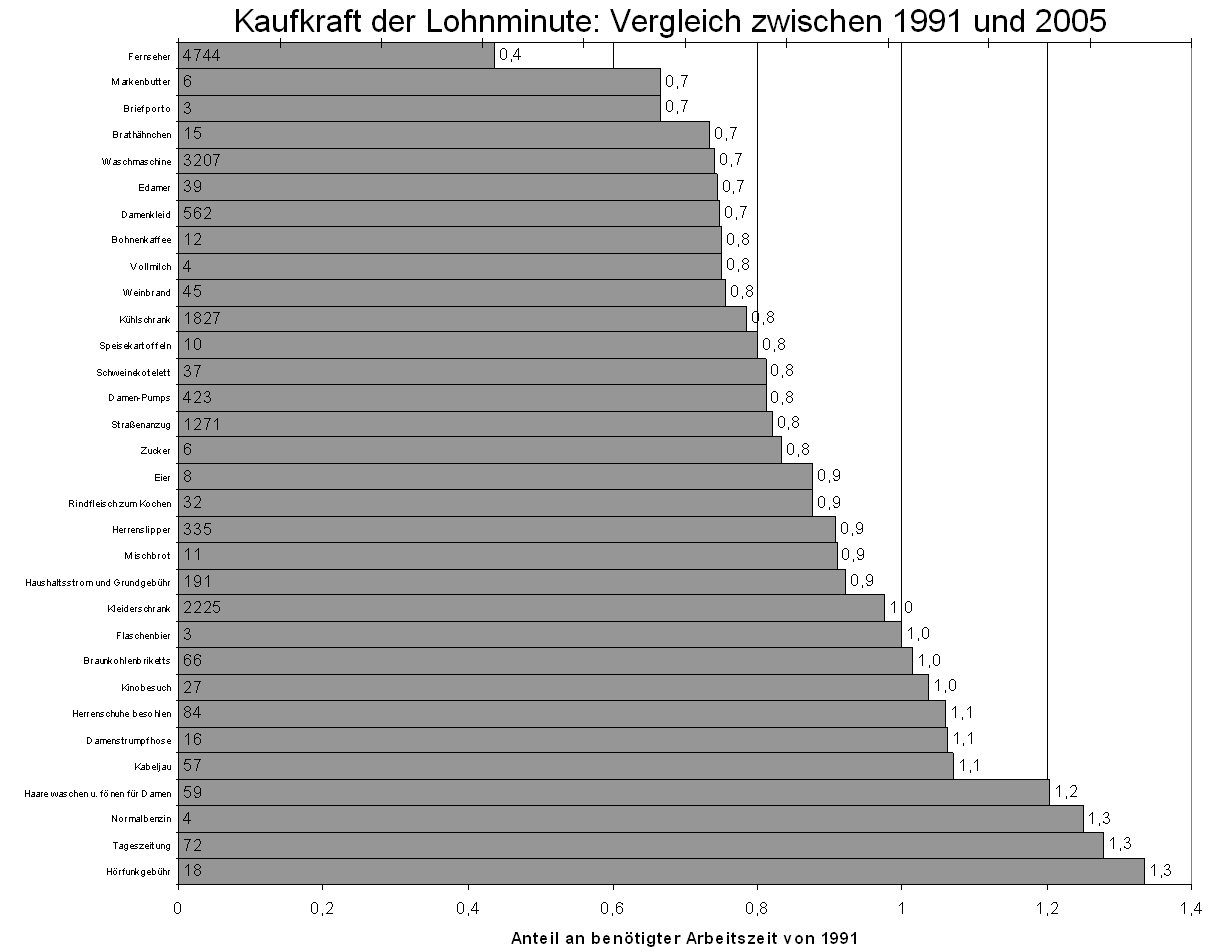 Kaufkraft der Lohnminute im prozentualen Vergleich 1991 zu 2005